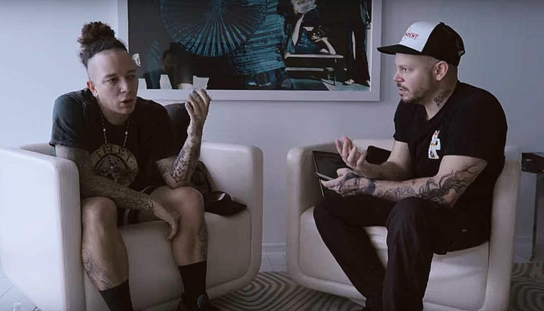 Nk y Residente conversando después de la polémica